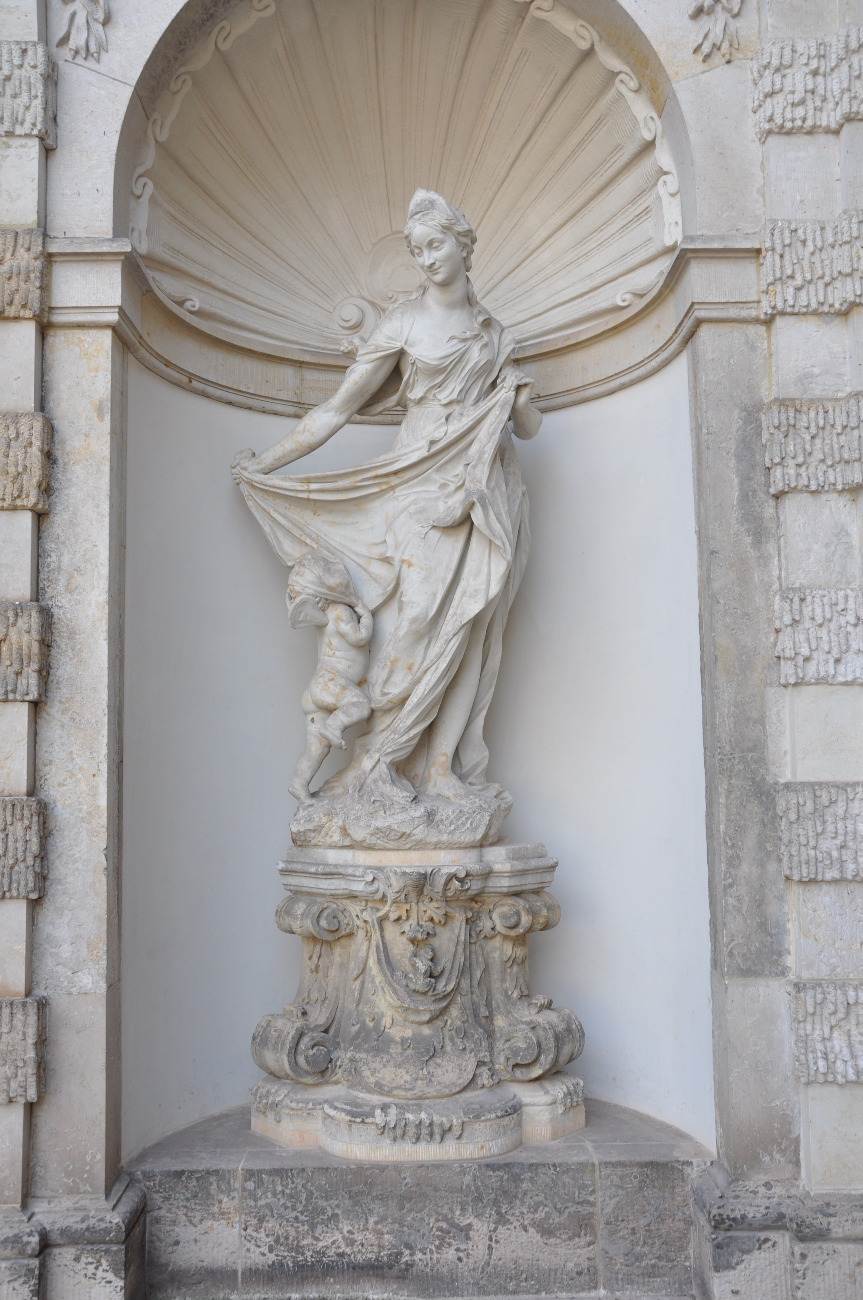 Dresden, Zwinger, Nymphenbad; Spielende Nymphe. Sandstein; H. 250 cm (1718/1719; P. Egell)